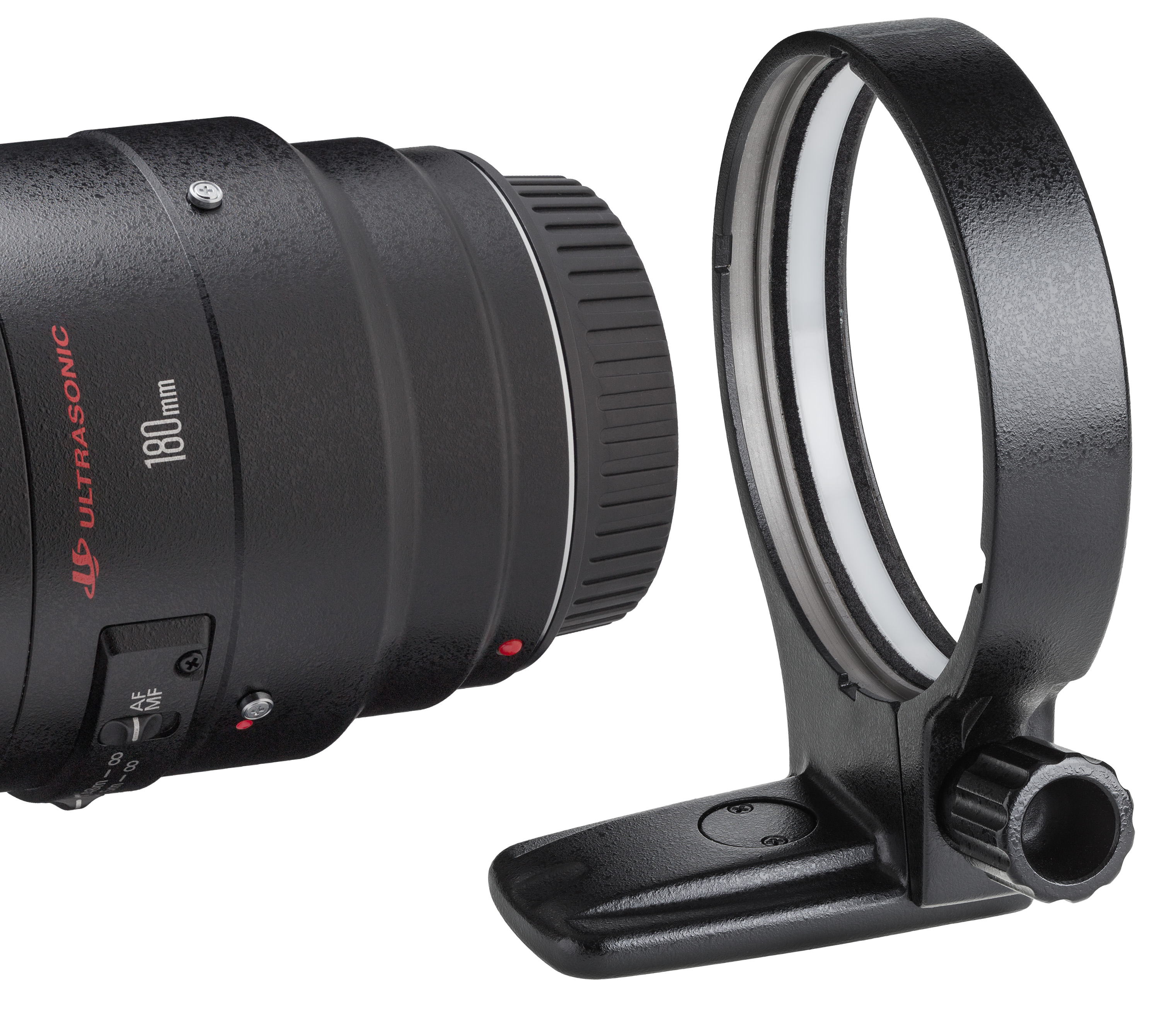 Canon Stativring B neben 180 mm Objektiv